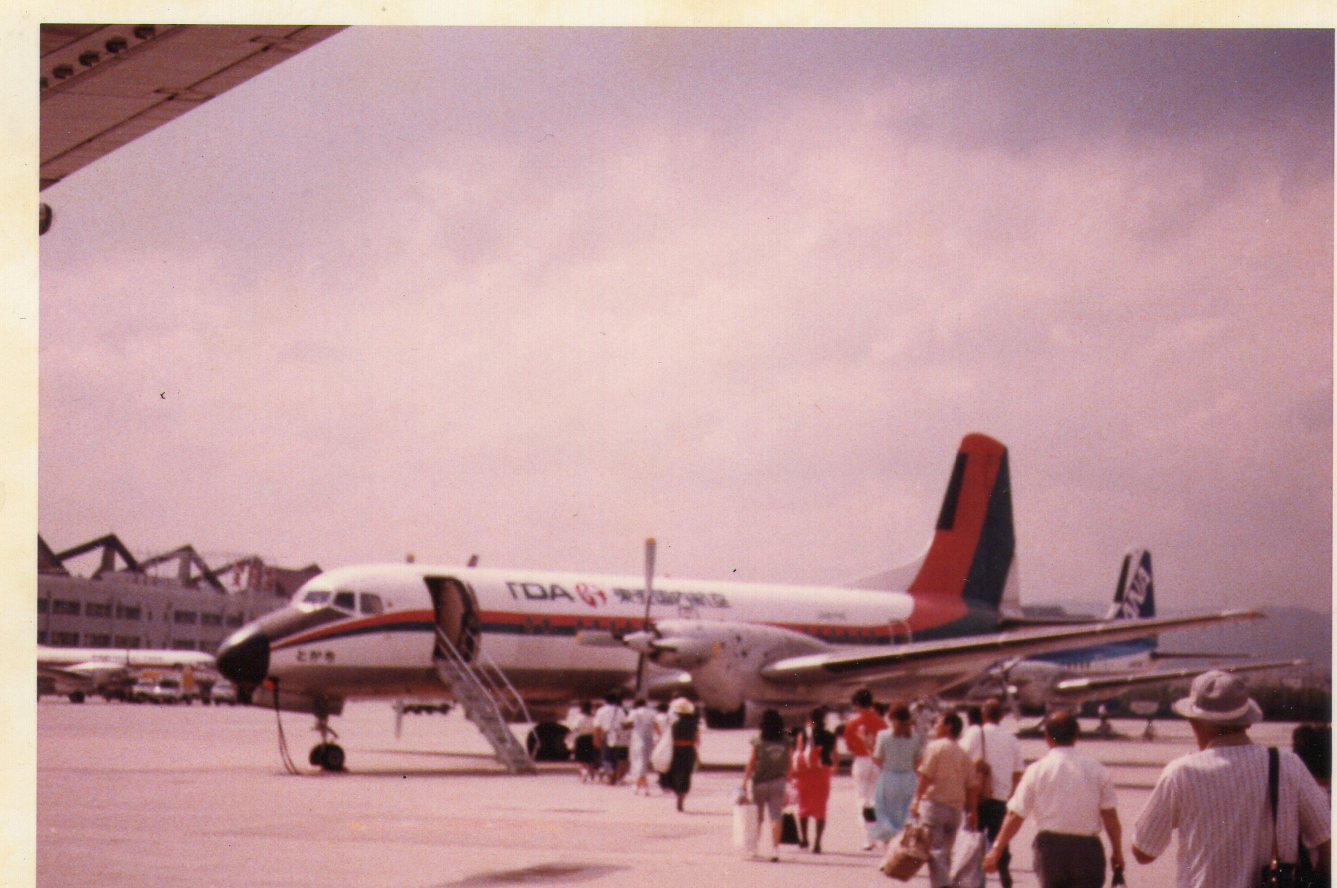 87年夏？大阪空港にて？YS-11とかち